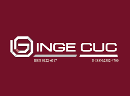 logo inge cuc